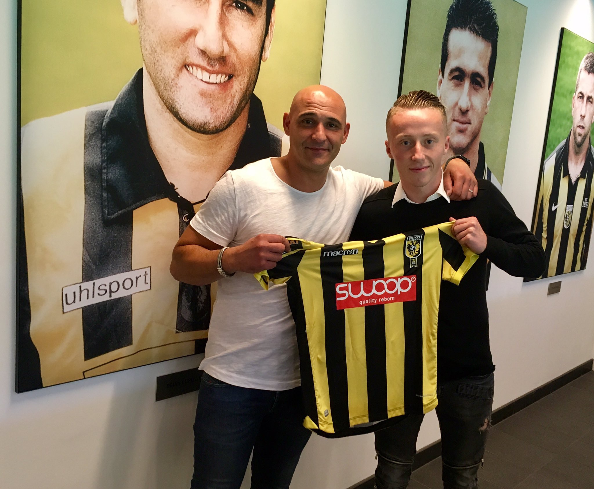 Lars ten Teije